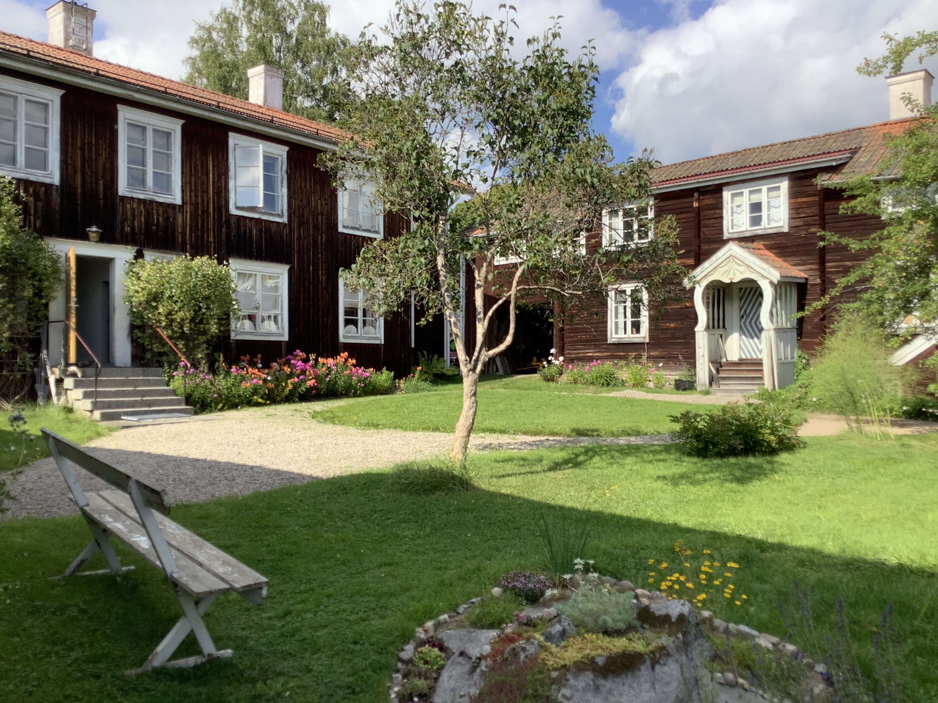 Oljons är en trebyggd hälsingegård i Bondarv 3-4 kilometer söder om Järvsö. Den ligger tätt intill en annan hälsingegård, Karlsgården, också kallad Karls i Bondarv, vars byggnader är omålade, till skillnad från byggnaderna tillhörande Oljons.